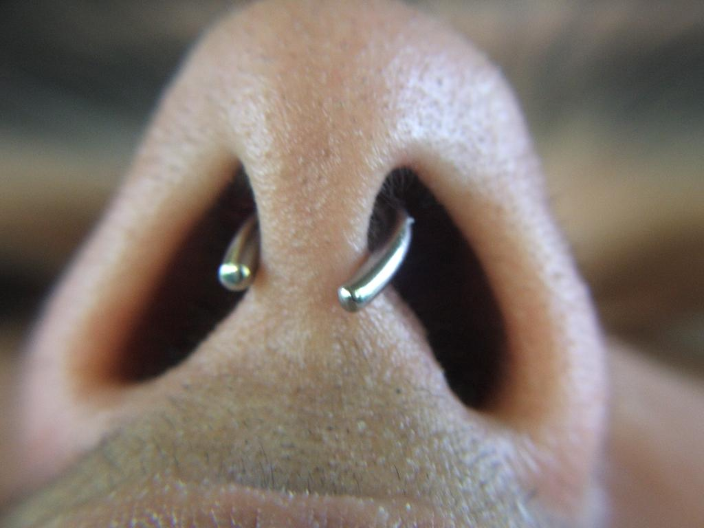 vic nose